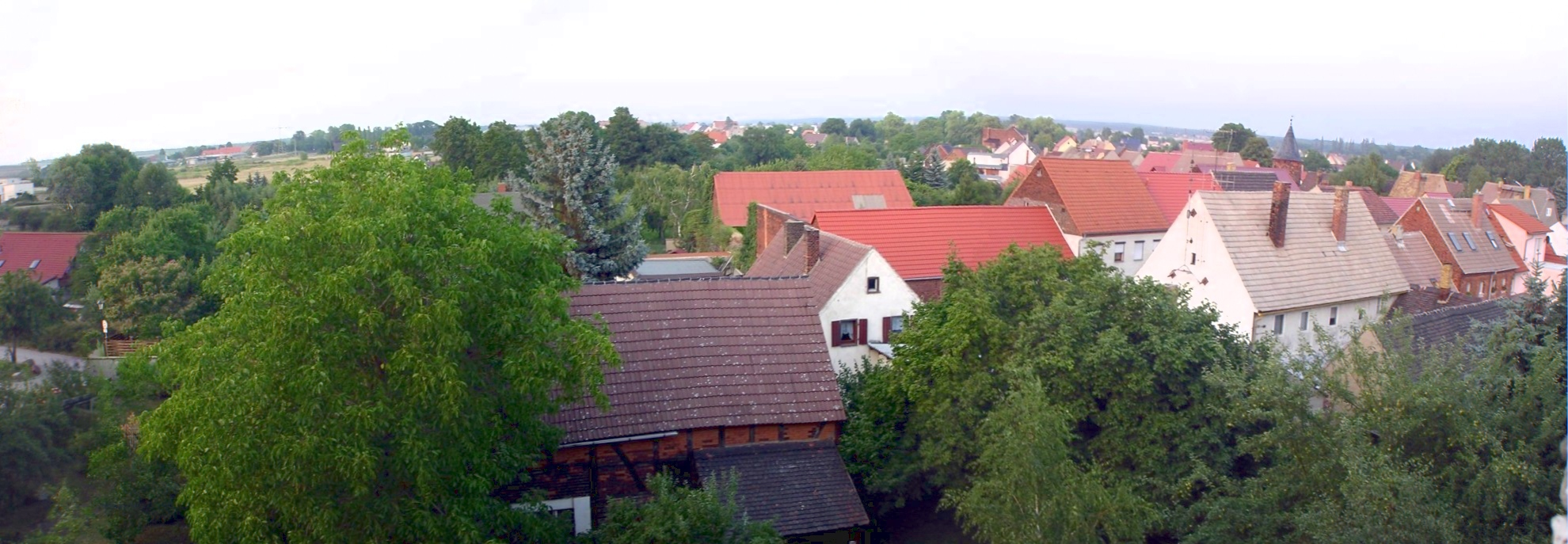 Blick auf Unterstadt von Gräfenhainichen